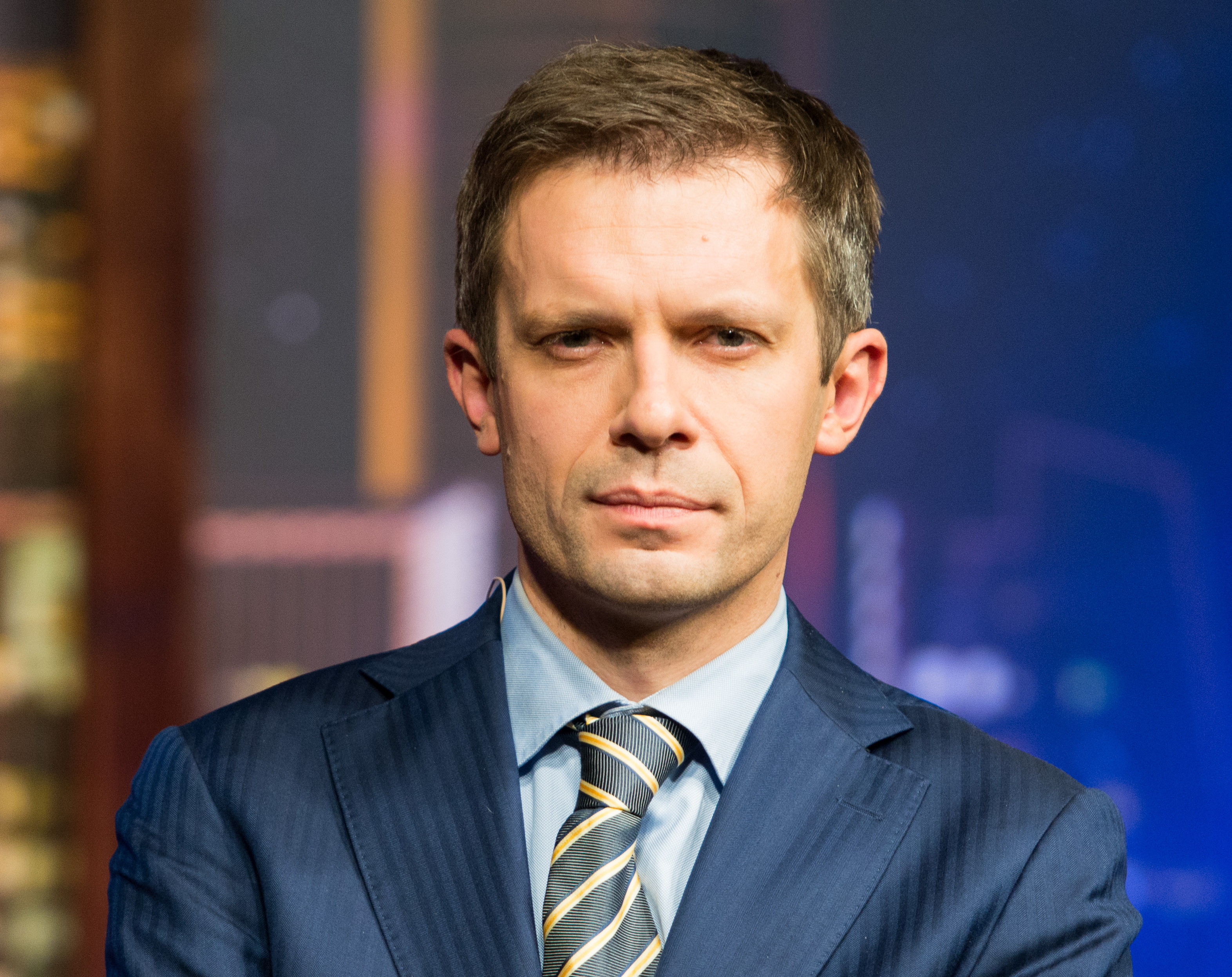 Andrius Tapinas laidoje "Laikykitės ten su Andriumi Tapinu"